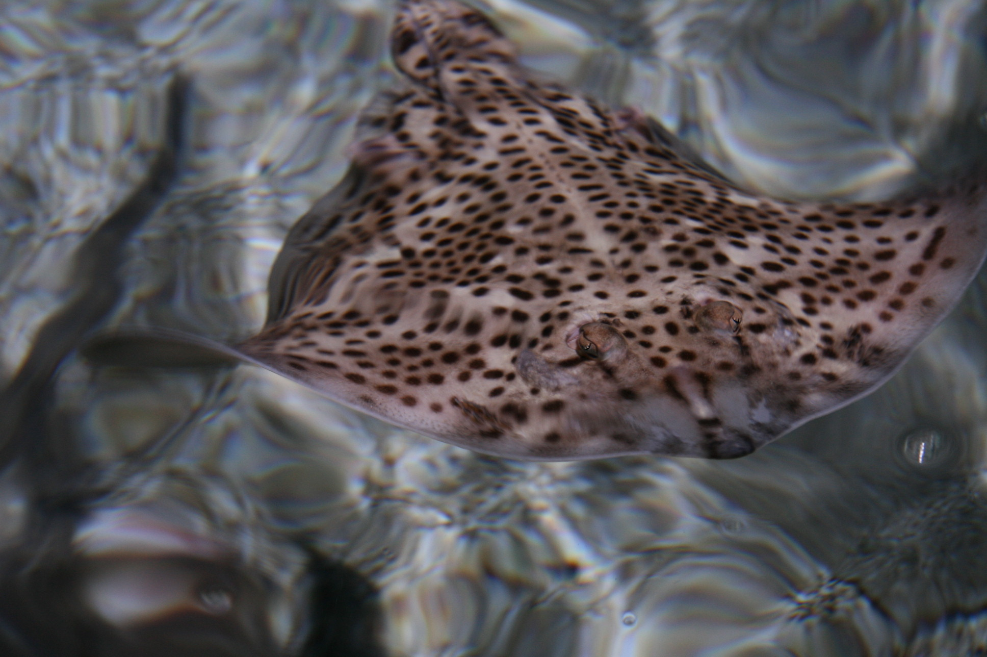 Raja montagui (Fleckenrochen)